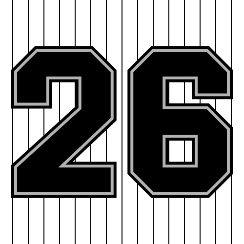 千葉ロッテマリーンズの背番号26の画像。自ら作成。